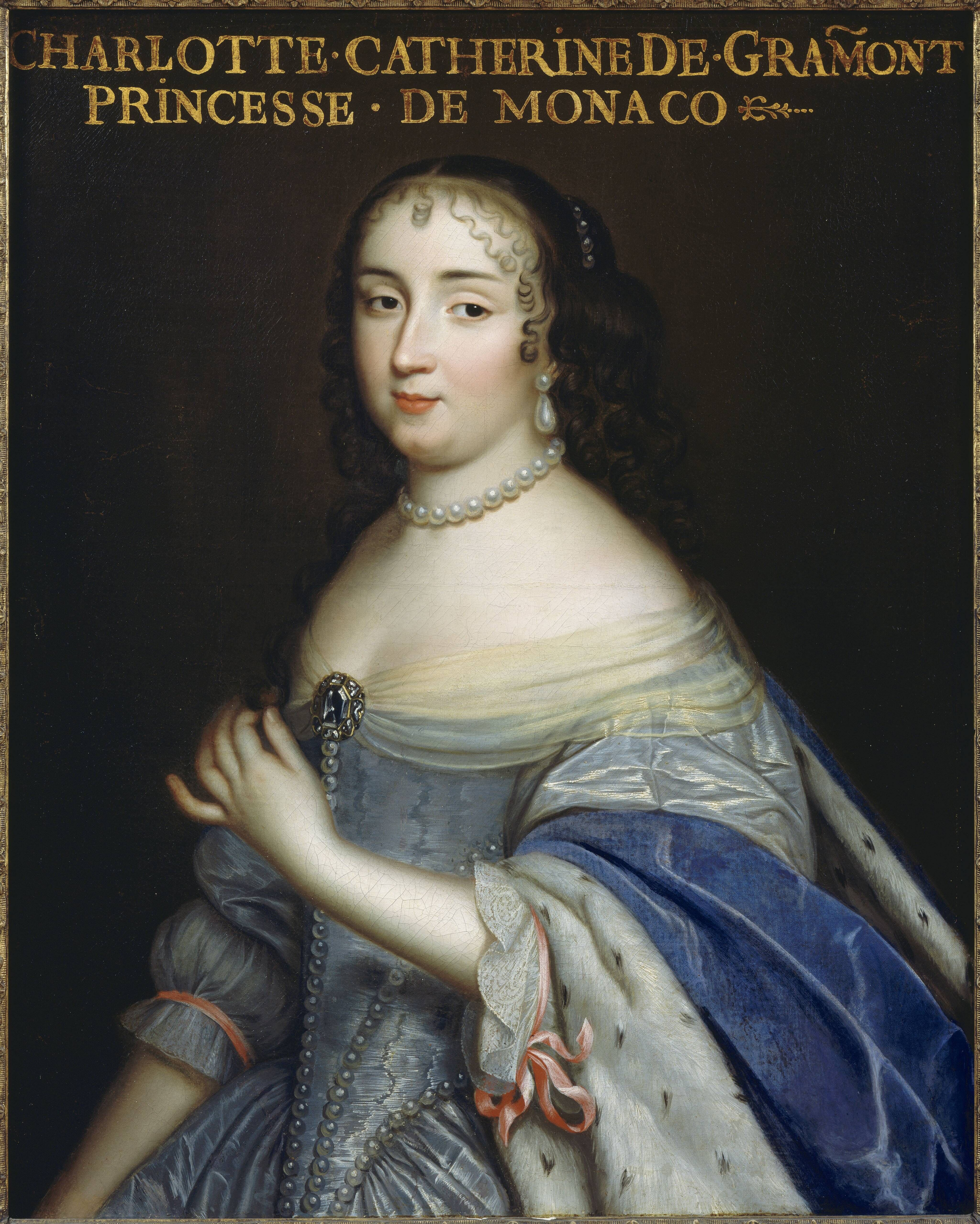 Catherine-Charlotte de Gramont (1638-1678), Prinzessin von Monaco und Herzogin de Valentinois, sowie Mätresse des französischen König Ludwig XIV.